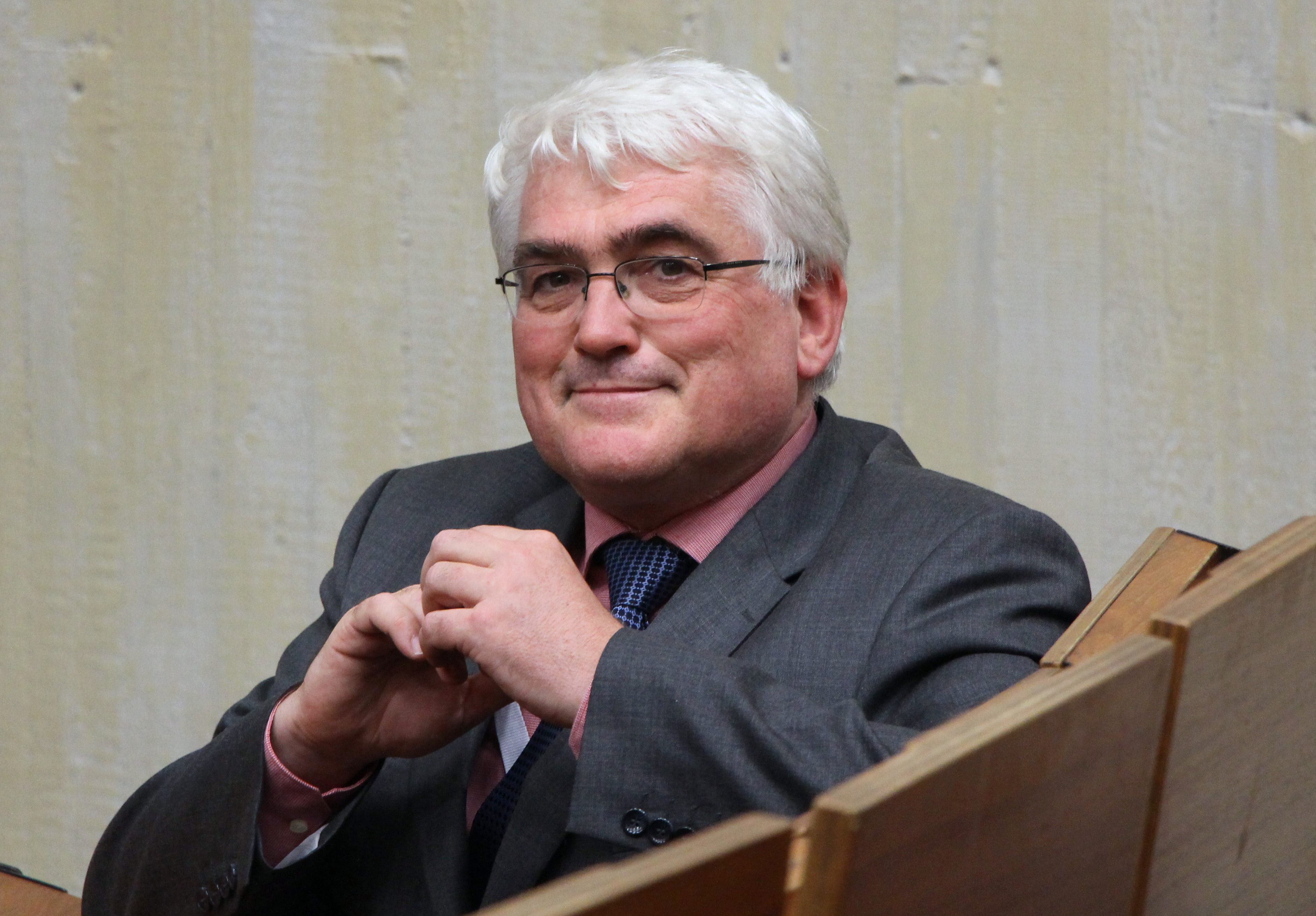 Ulrich Bongertmann beim Historikertag 2014 in Göttingen.